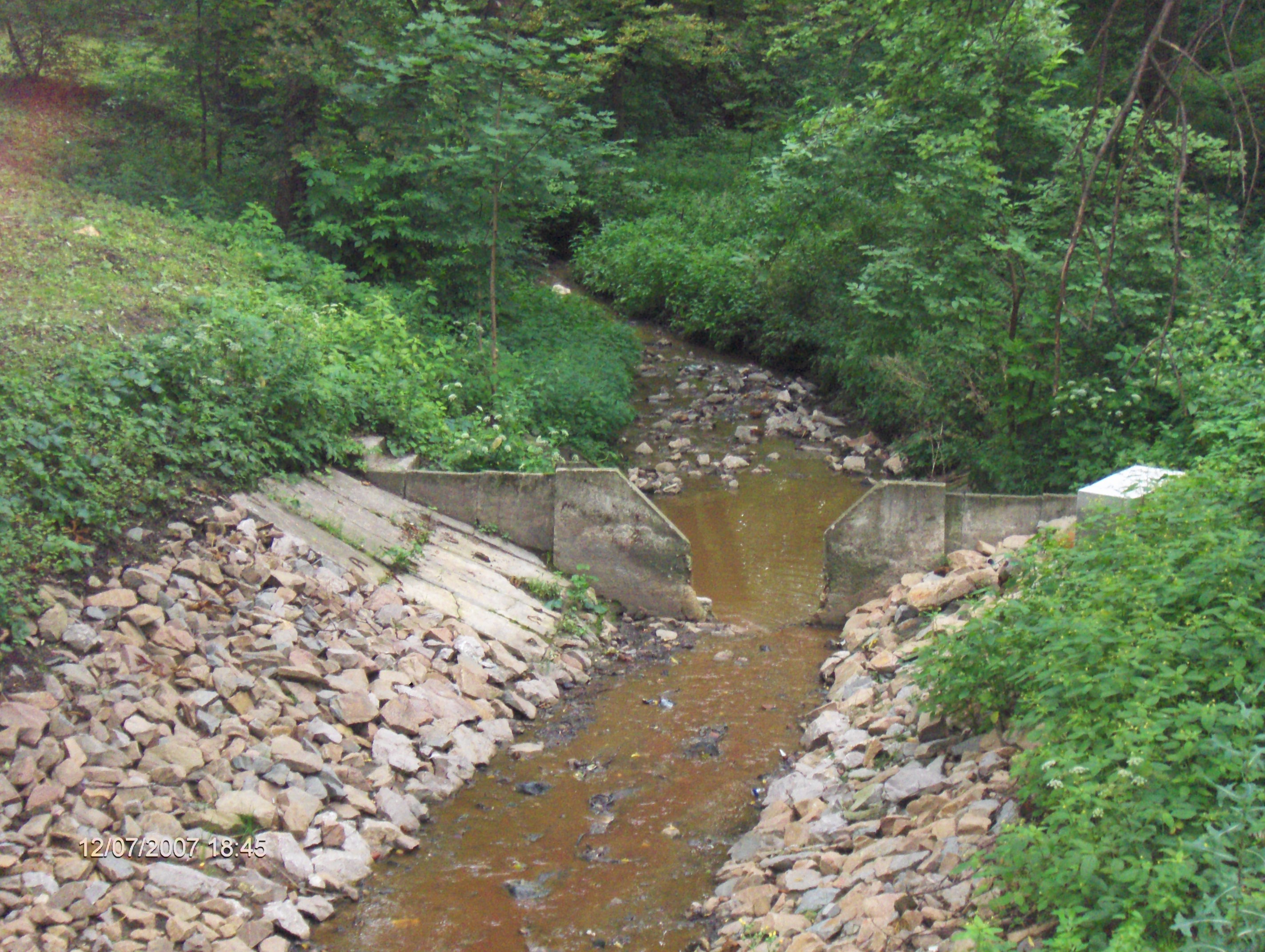 Serafa koło Parku A. Mickiewicza